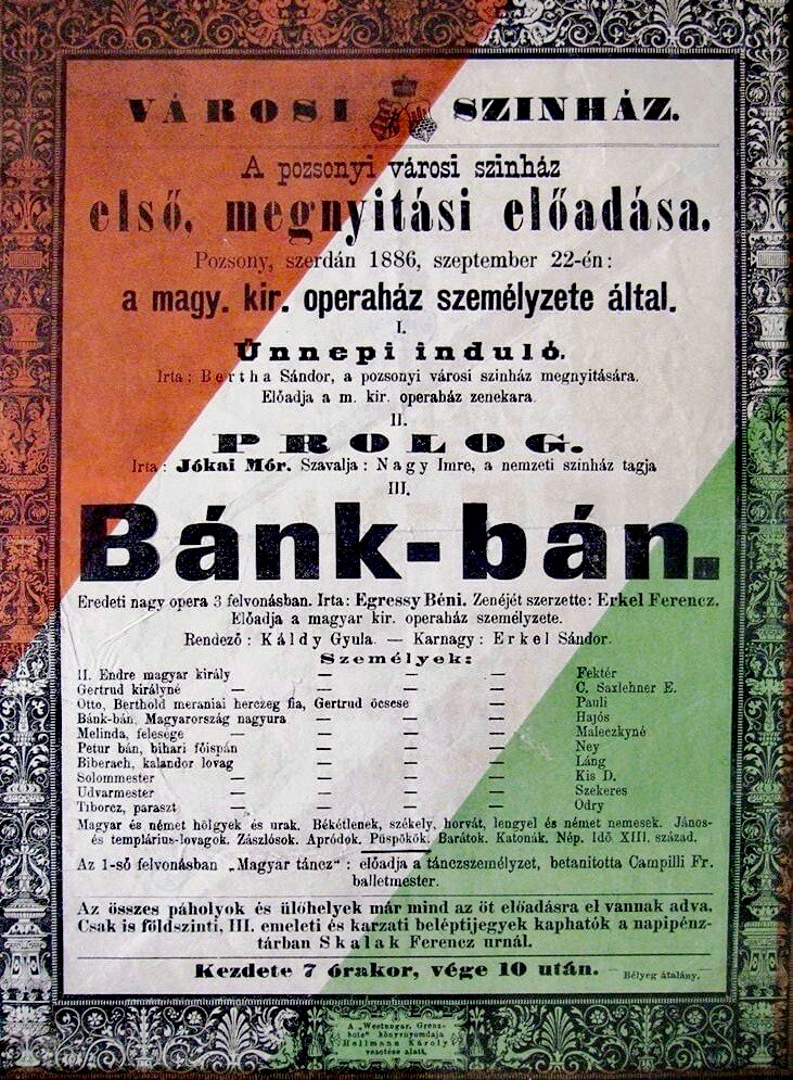 Angekündigt wurde die Oper 'Bánk Bán' des ungarischen Komponisten Ferenc Erkel für die Eröffnung am 22. 09.1886